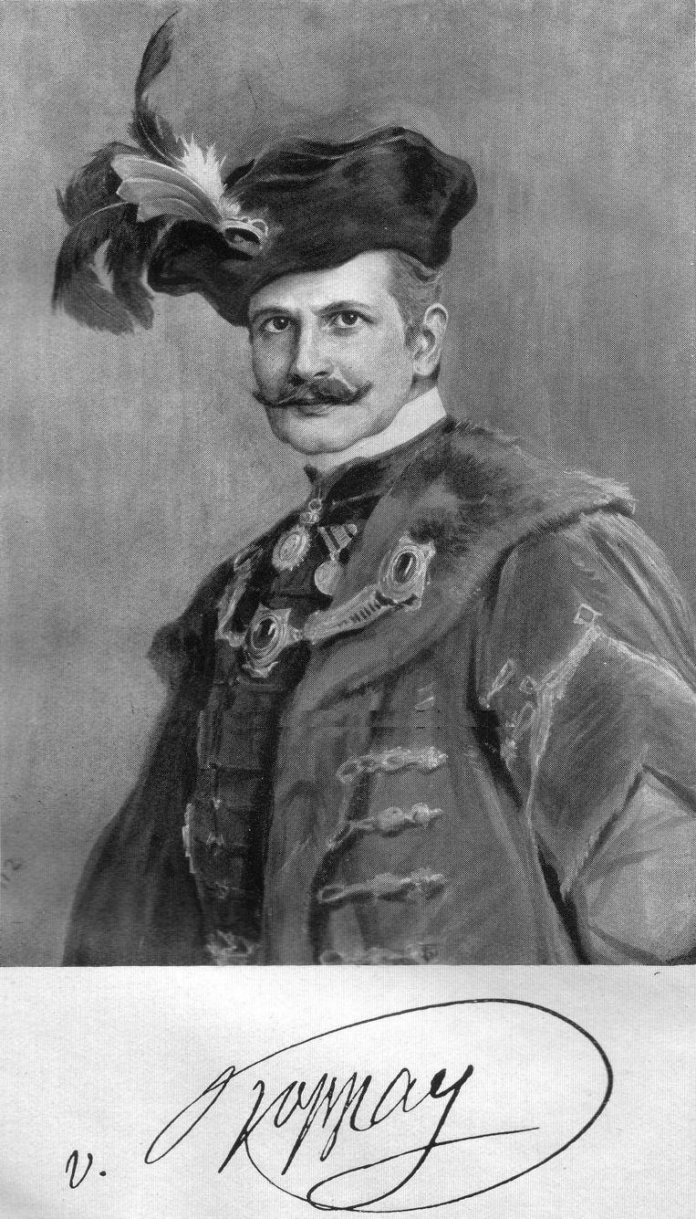 Self-portrait